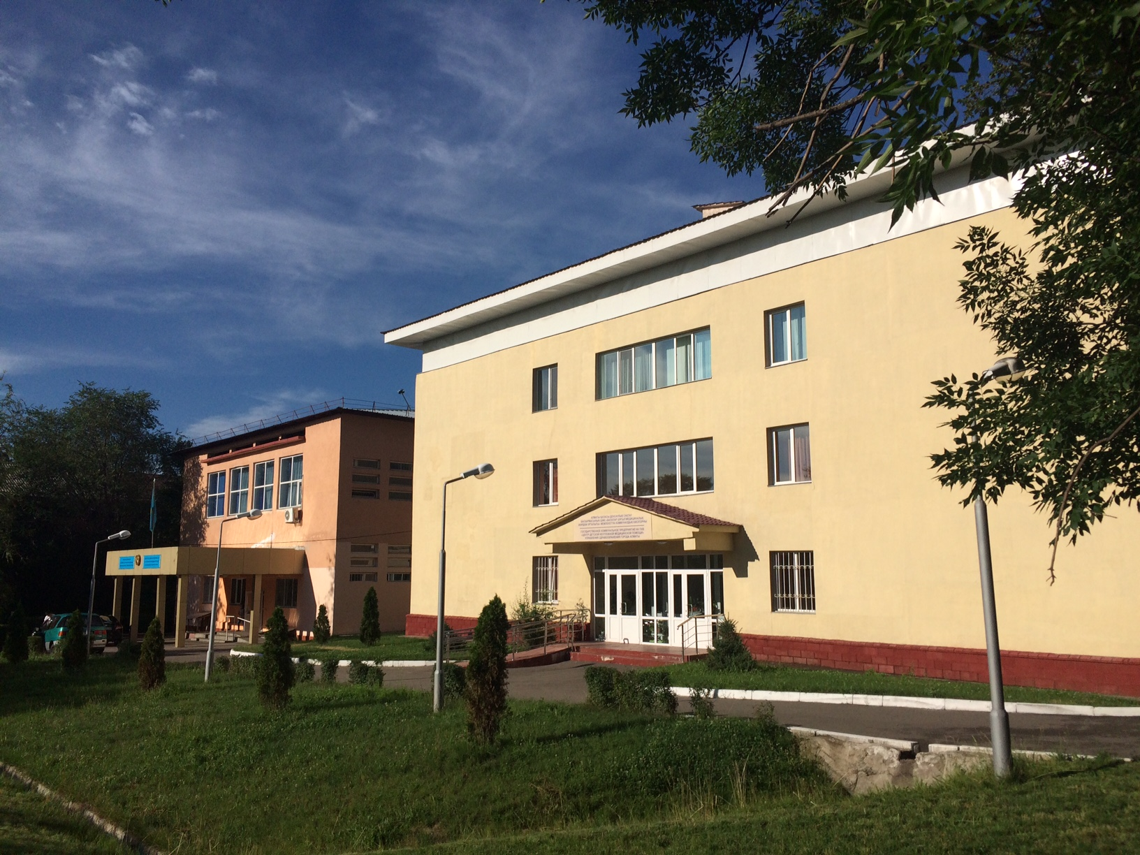 Детская клиническая больница № 1 в Алматы